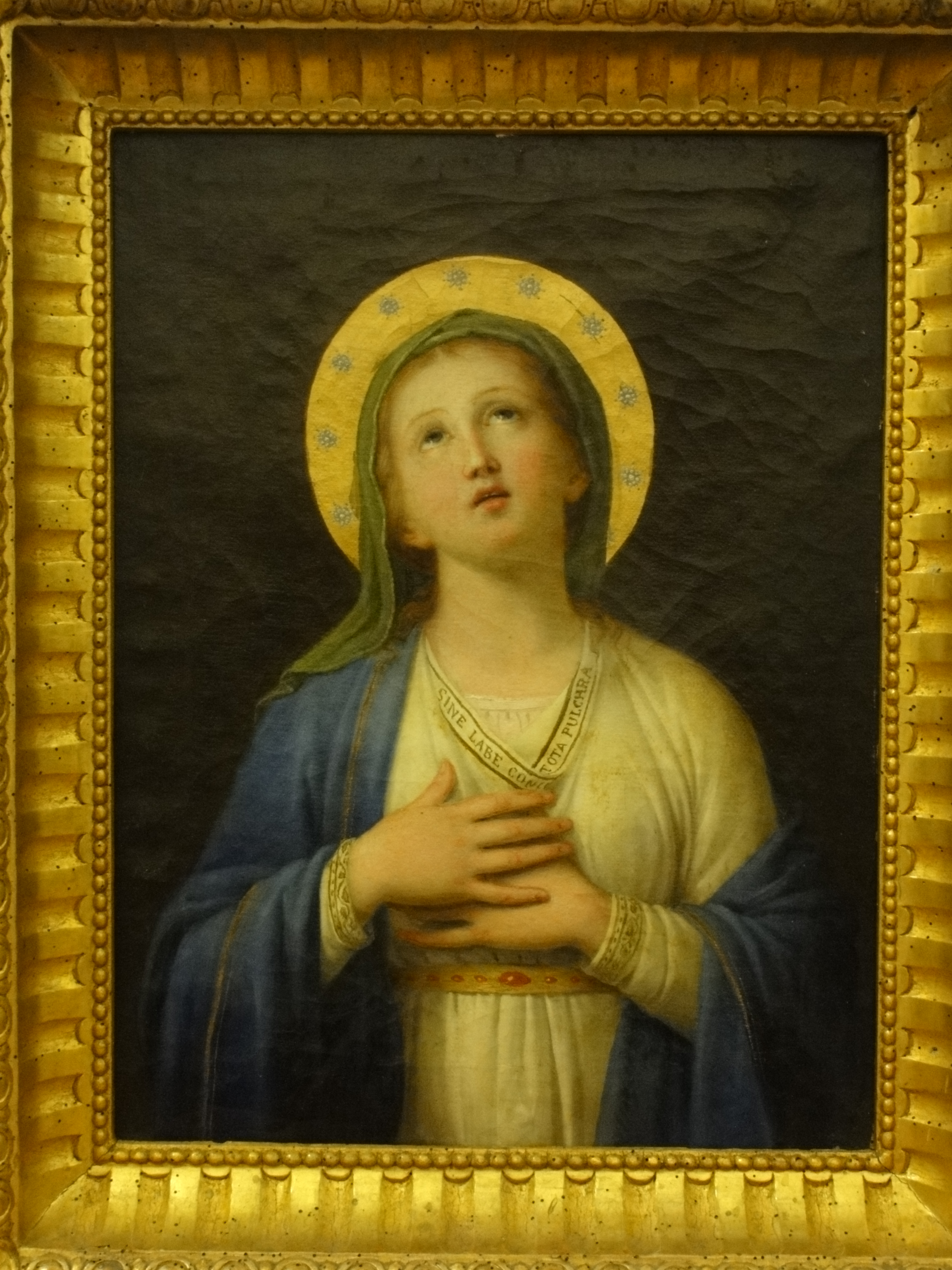 Assisi, Sacro Convento, Immacolata Concezione, dipinto su tela di Andrea Pozzi (1779-1837)